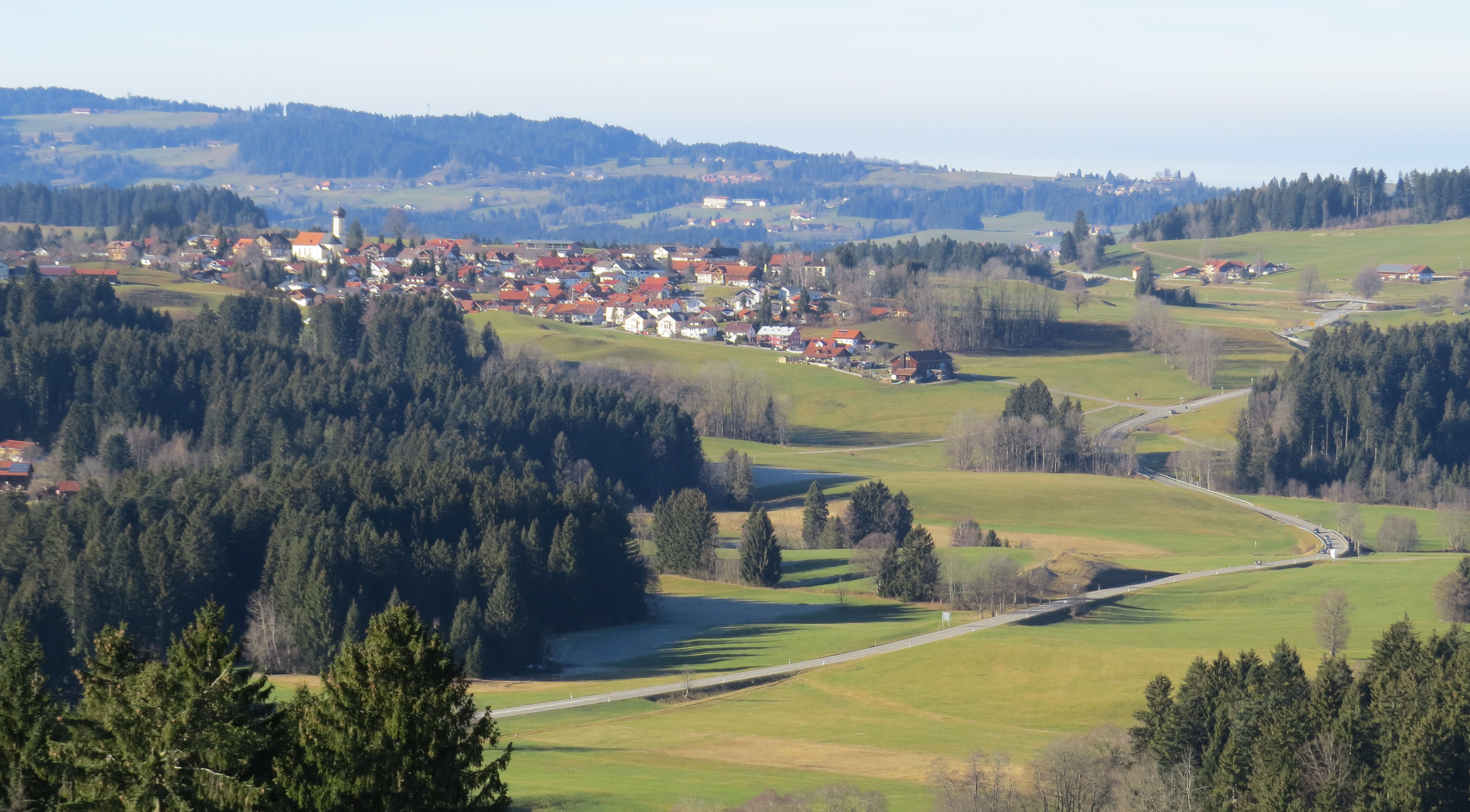 Oberreute von Osten, B 308